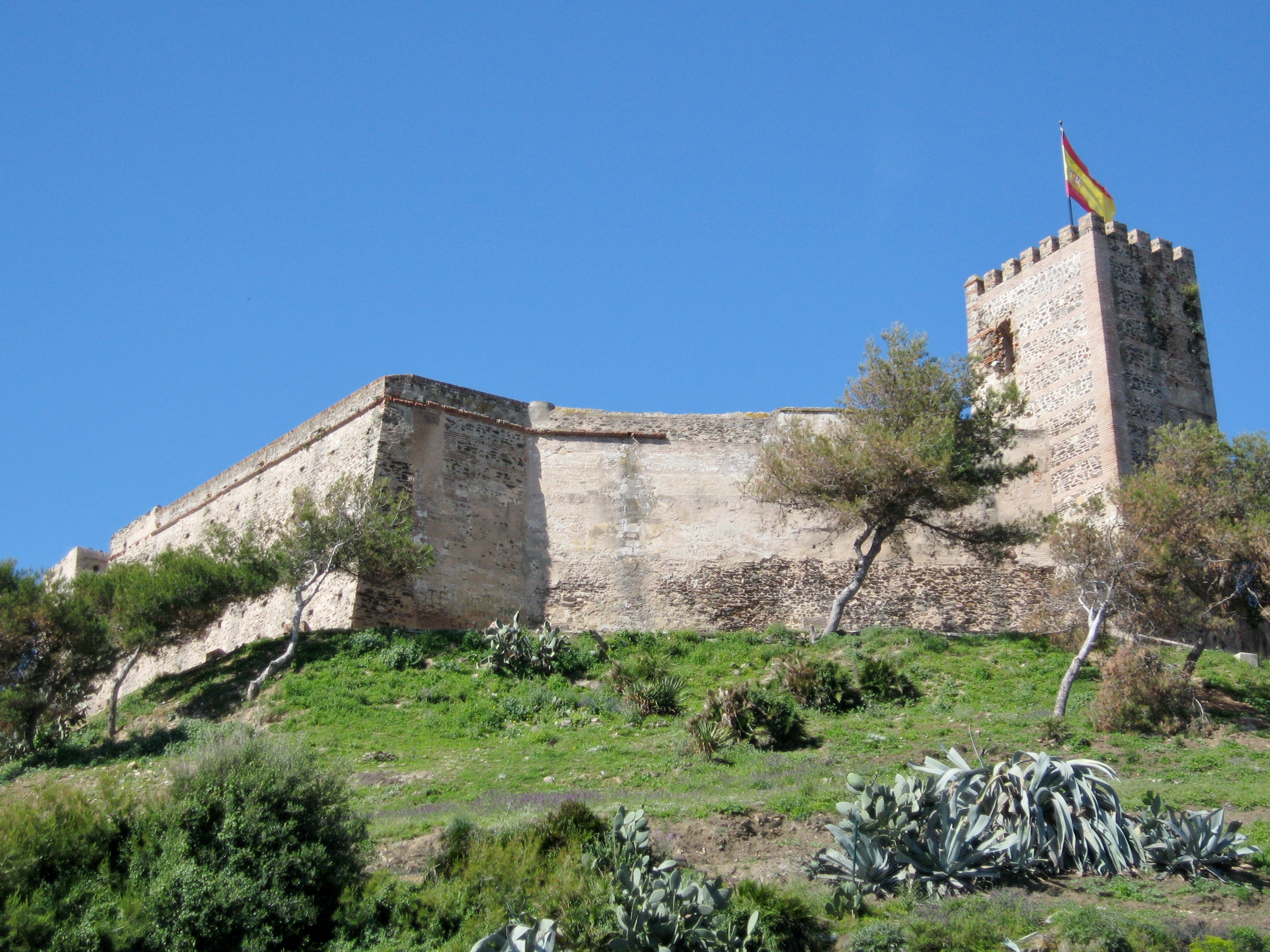 Burg von Sohail (Sujayl), Fuengirola, Provinz Málaga, Andalusien, Spanien